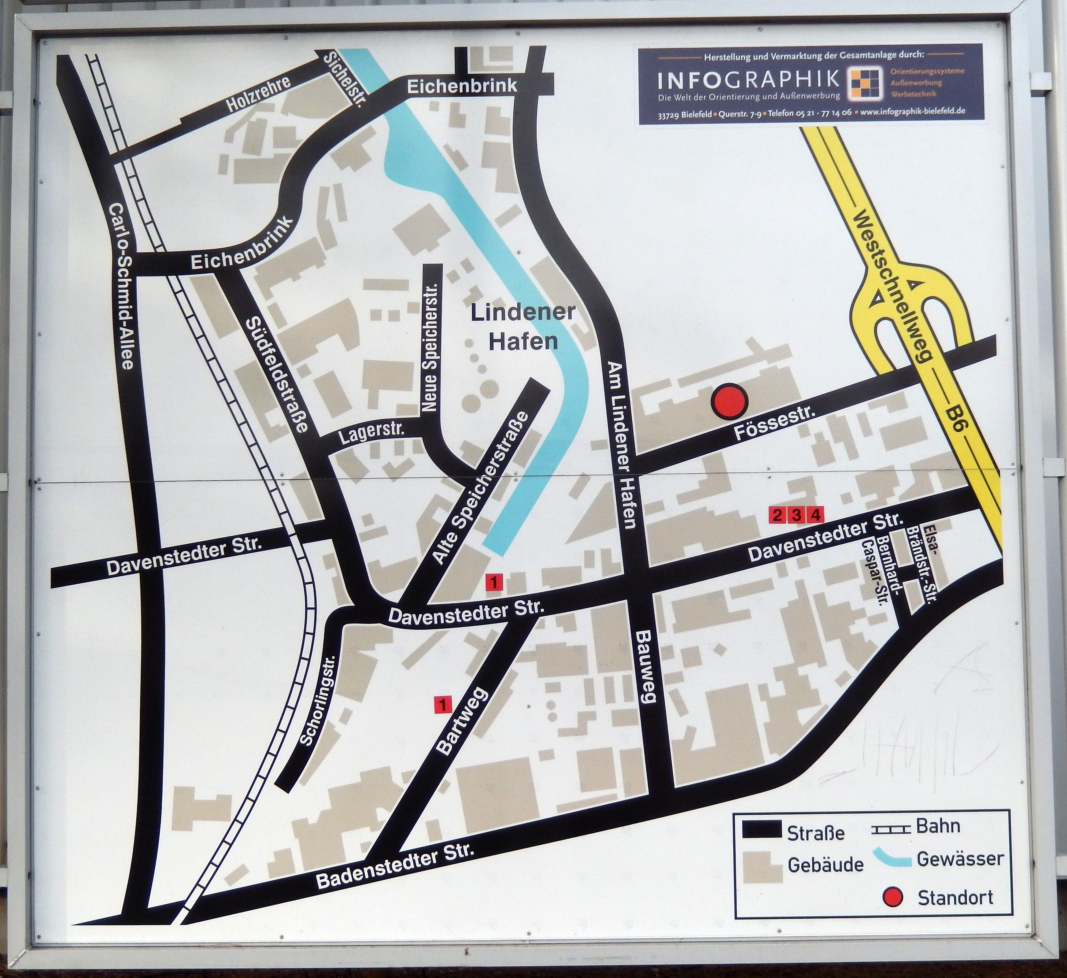 Lindener Hafen Karte in der Fössestraße